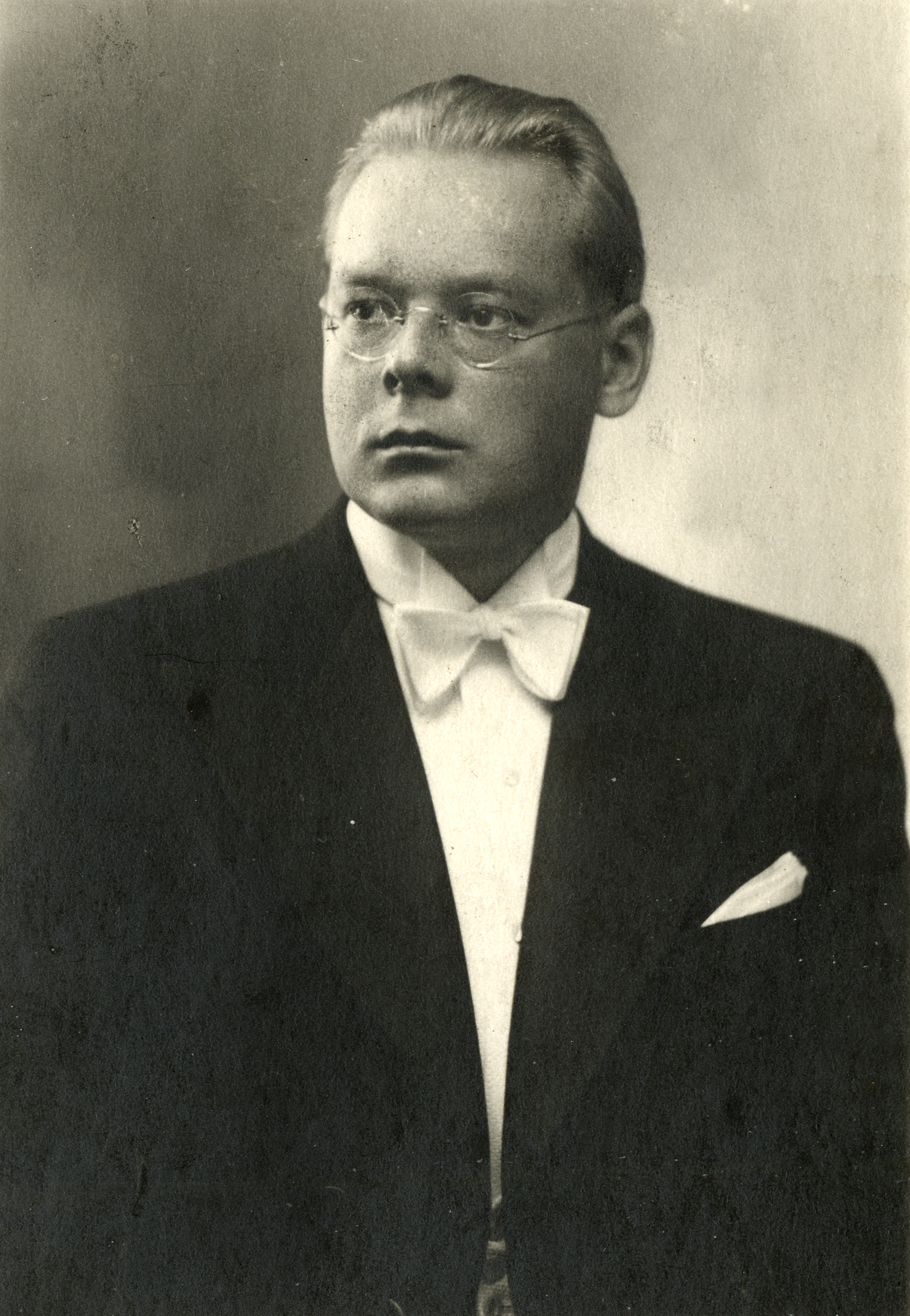 Riigi Ringhäälingu sümfooniaorkestri oboemängija Jaan Hargel, september 1938.